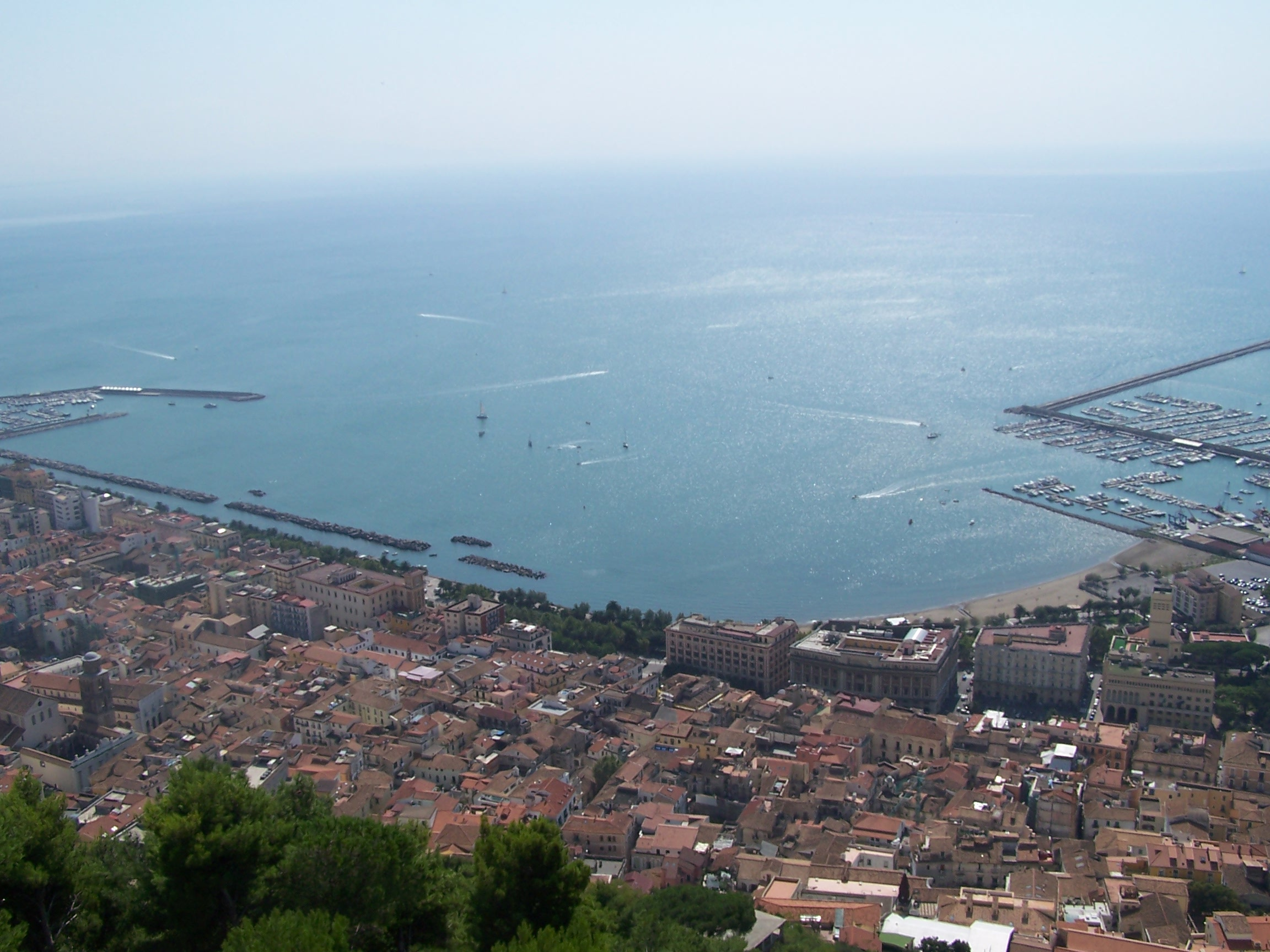 Panorama sul centro storico di Salerno dal castello di Arechi. Foto personale. Salerno, settembre 2006